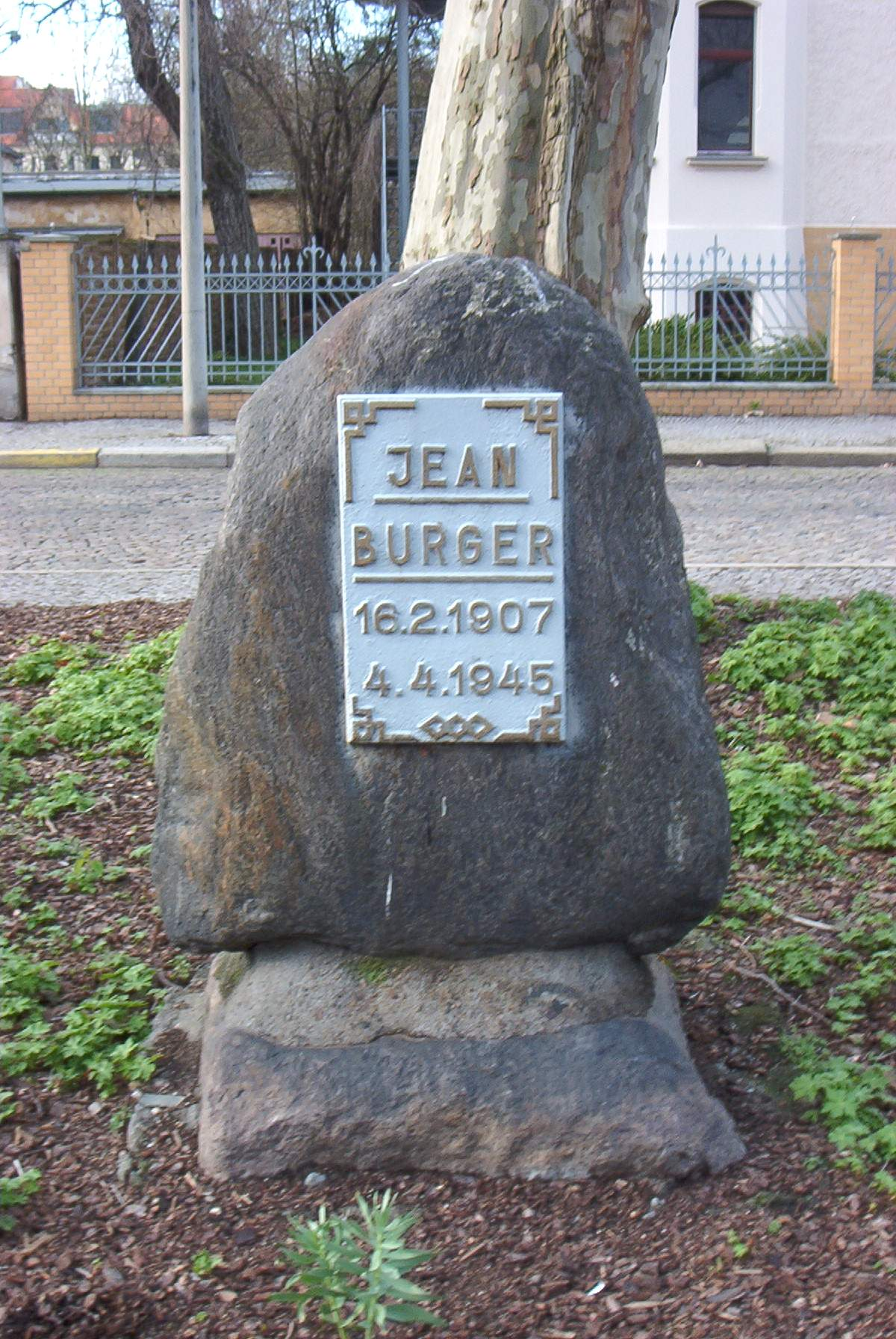 Gedenkstein für Jean Burger in der Lennéstraße in Magdeburg, selbst aufgenommen am 7.4.2005, erteilte Lizenz:GNU-FDL